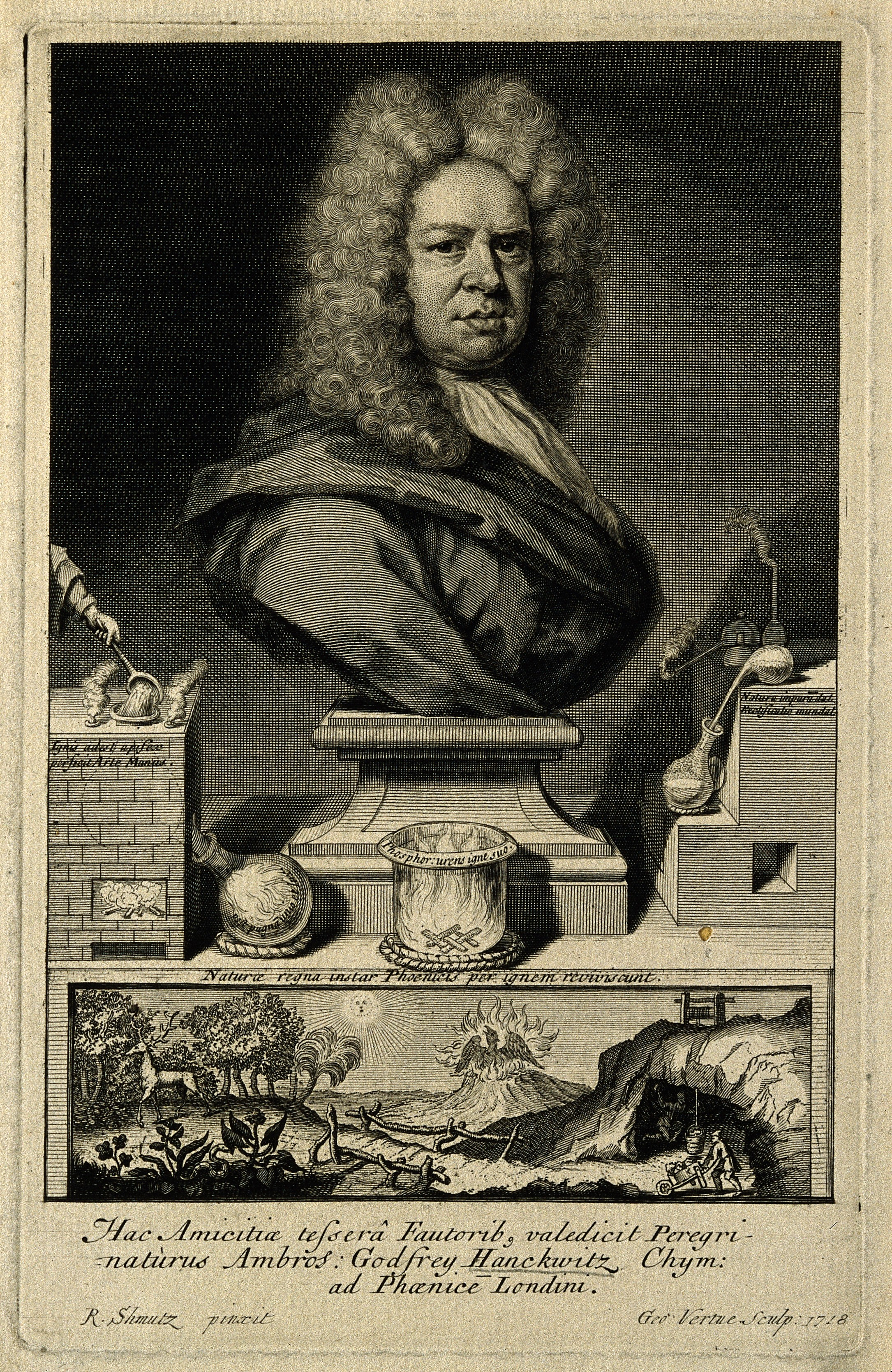 Ambrose Godfrey [Hanckwitz]. Line engraving by G. Vertue, 1718, after R. Schmutz. Iconographic Collections Keywords: portrait prints; engravings; R. Schmutz; Ambrose Godfrey; George Vertue